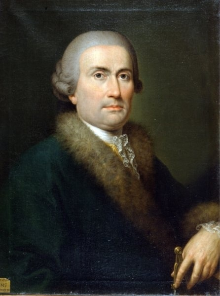 Giuseppe Piermarini, ritratto realizzato da Martin Knoller nella secodna metà del '700, esposto al Museo Teatro alla Scala di Milano